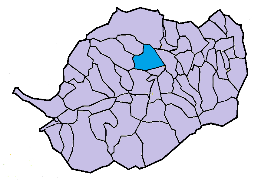 Conat en el Conflent, a partir del mapa municipal del Conflent de lliure disposició adaptat al Nomenclàtor toponímic aprovat el 2007